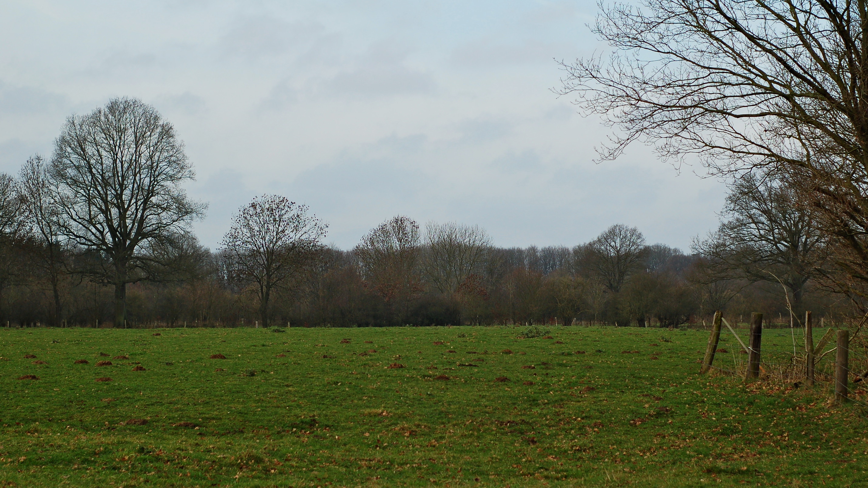 Münstersche Parklandschaft auf dem Standortübungsplatz Dorbaum, Münster; Naturschutzgebiet „Emsaue“ (NSG MS-013).